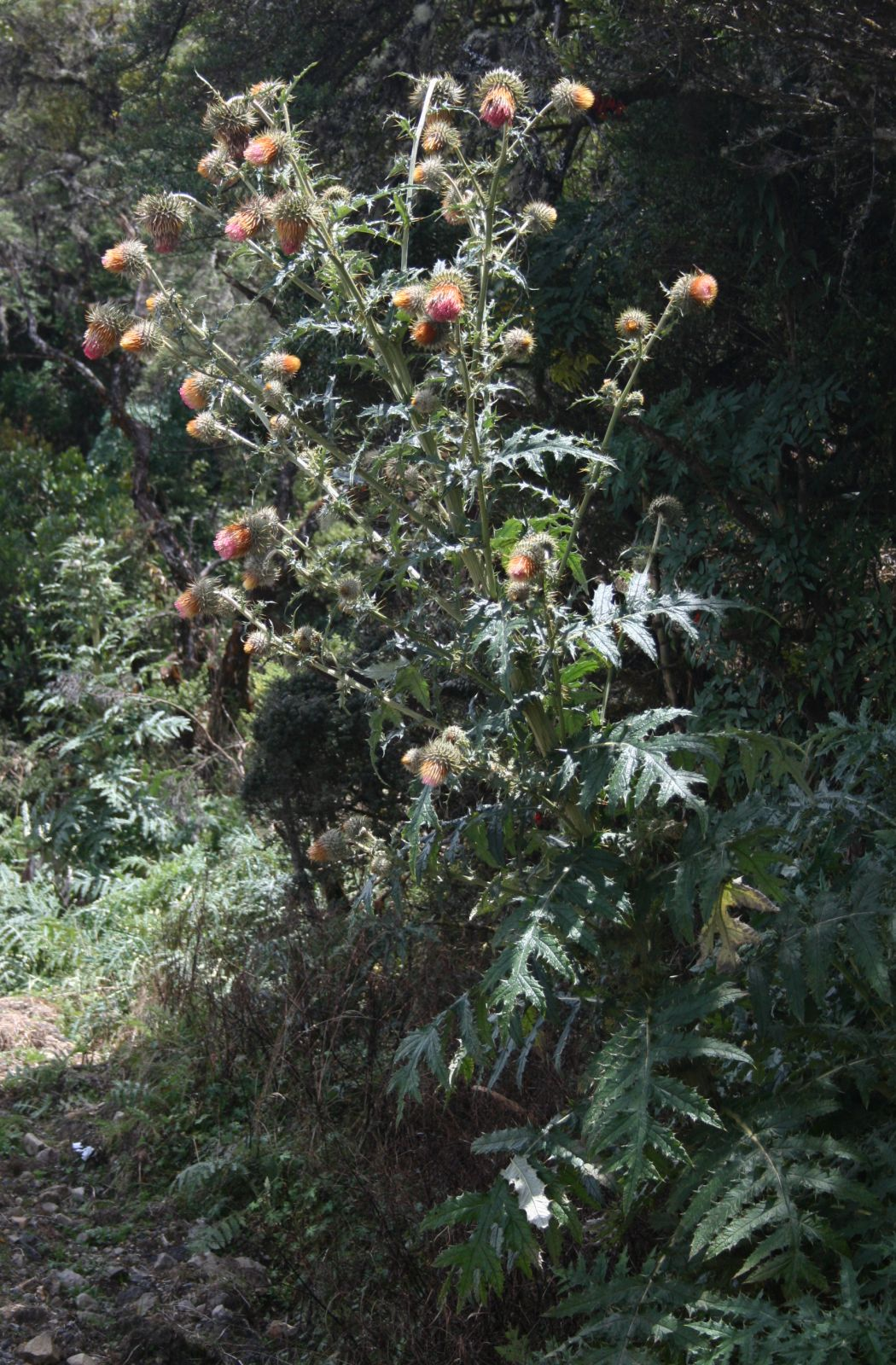 Cirsium subcoriaceum, Korbblütler (Asteraceae) - Costa Rica: Prov. Cartago, Cordillera de Talamanca, Carretera Interamericana N Cerro de la Muerte, ca. km 86, ca. 3150 m